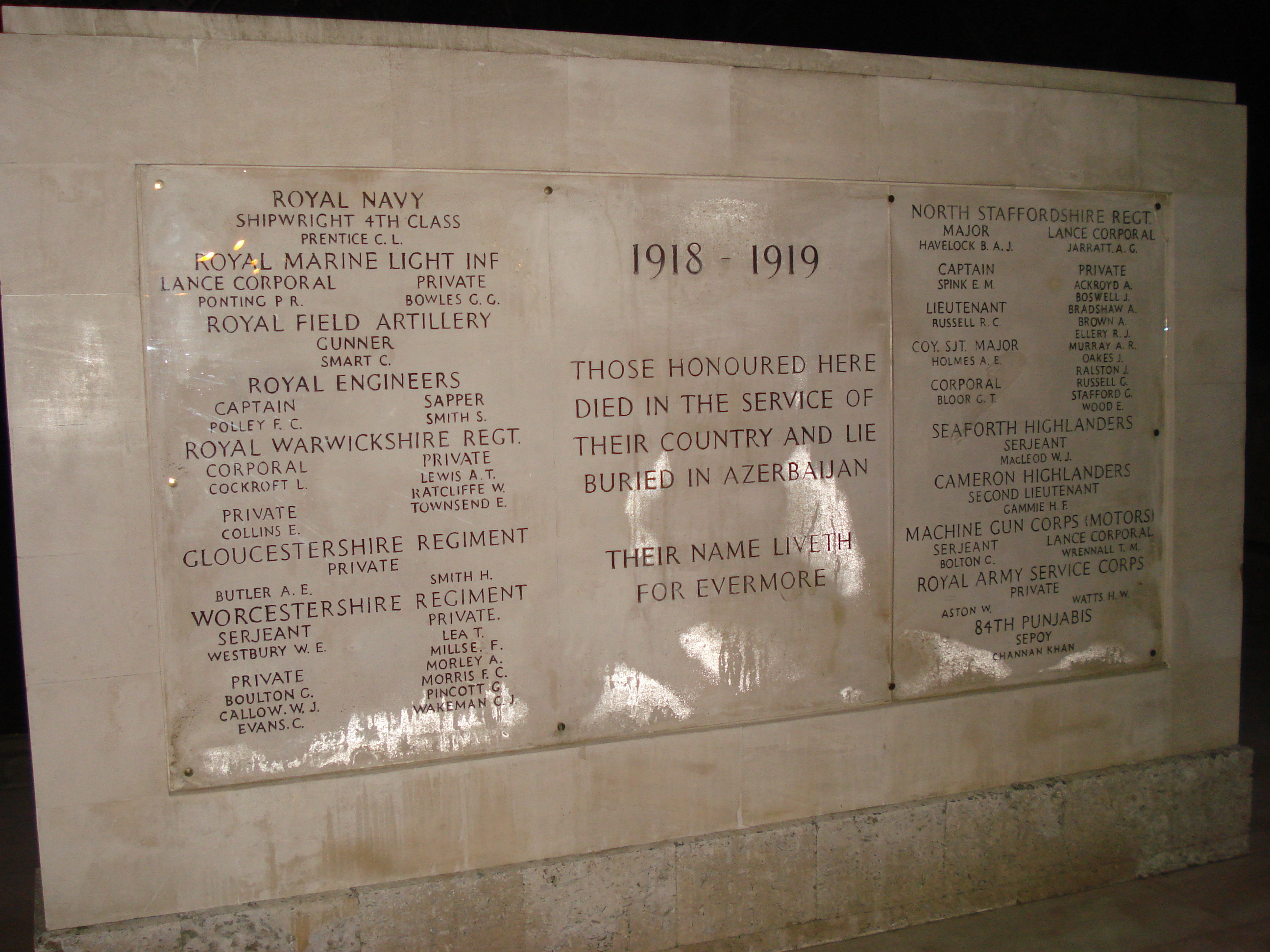 Мемориал погибшим англичанам в Баку, события 1918 года.